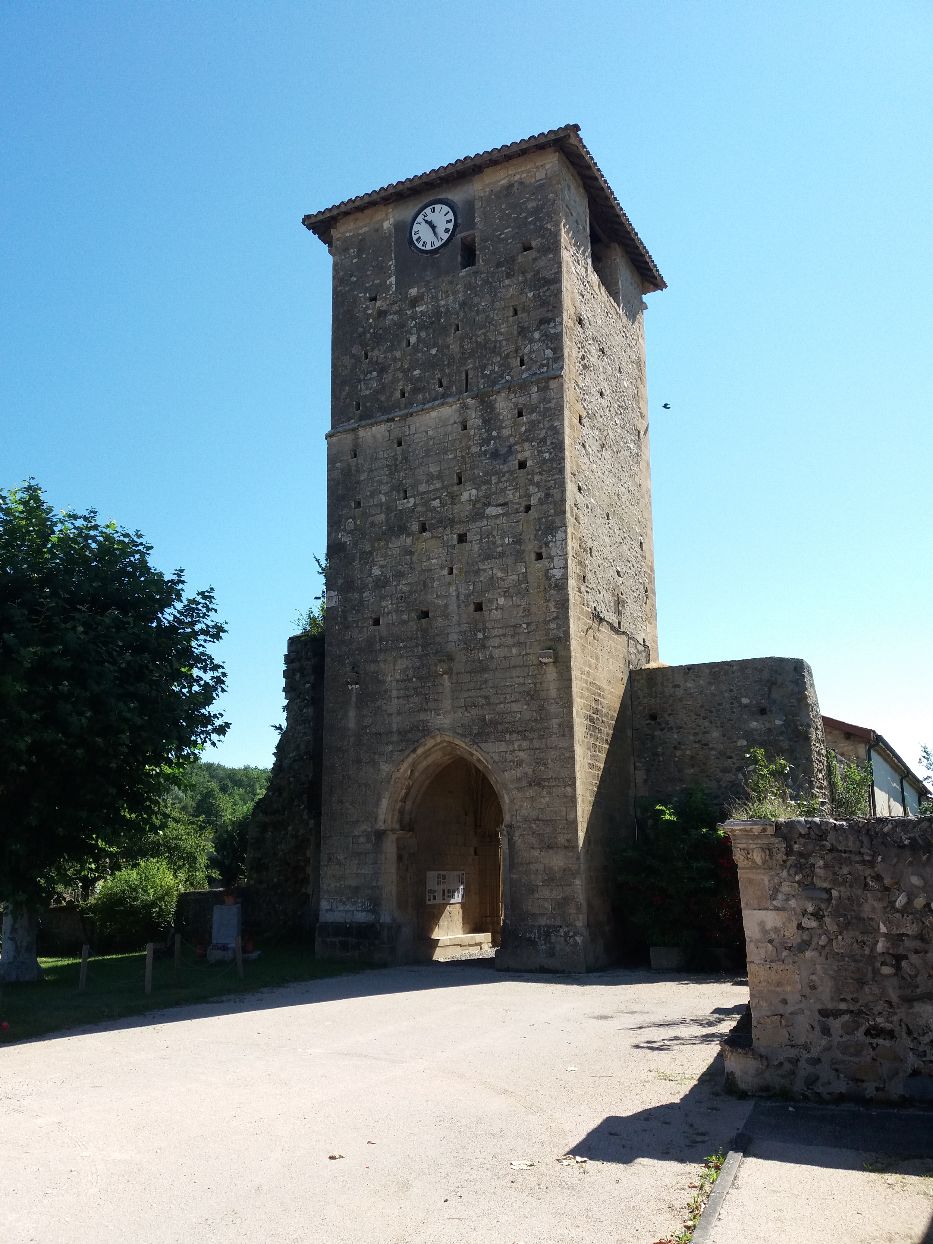 Église : clocher.